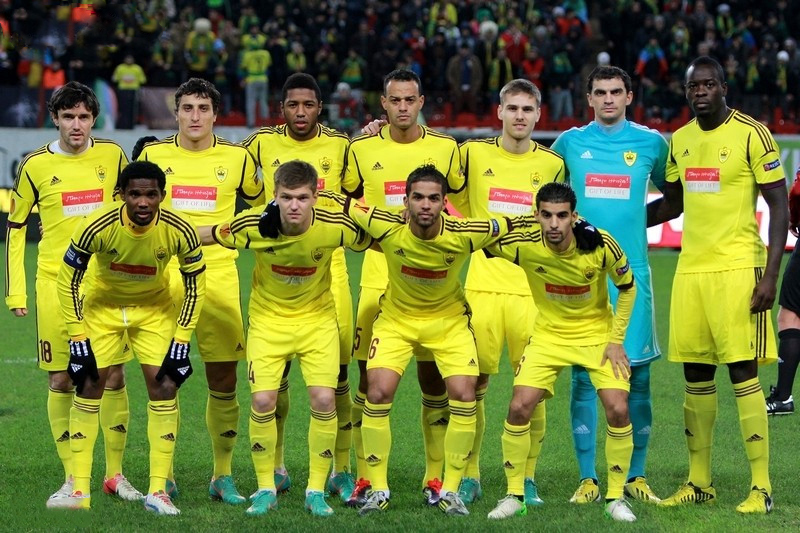 Анжи - Удинезе (22.11.2012)